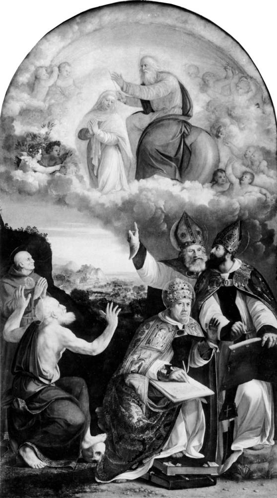 'Disputación sobre la Inmaculada Concepción con los cuatro Padres de la Iglesia y san Bernardo', de Dosso Dossi, cuadro pintado en 1532. Esta pintura formaba parte de las colecciones de la Gemäldegalerie Alte Meister de Dresde y está desaparecida desde el final de la Segunda Guerra Mundial, en 1945. - Dimensiones: 358 x 208 cm - Pintura al óleo sobre tabla